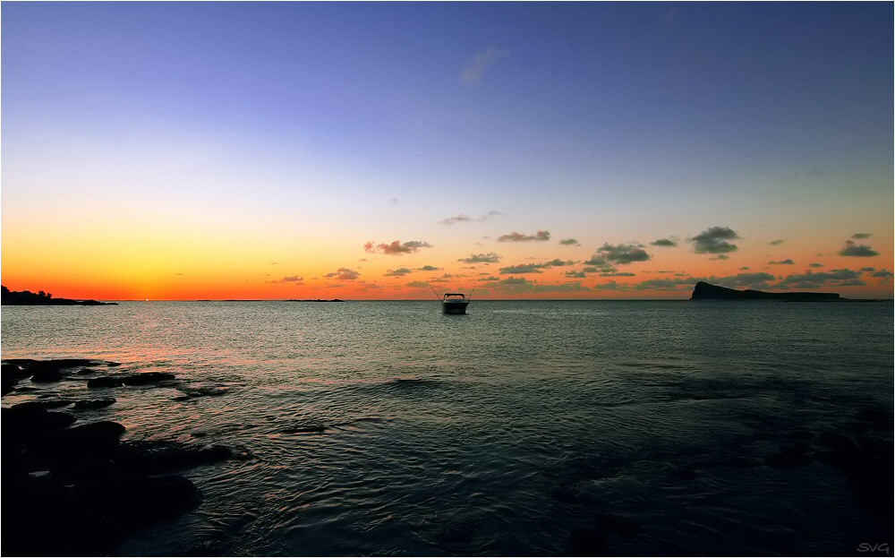 Sonnenuntergang auf Mauritius bei Cap Malheureux, dem Ort an dem die Engländer ihre Invasion der Insel starteten. Aufgenommen im Juni 2006 mit einer Canon 30D, Belichtungszeit 1/160sec, Blende 9.0, ISO400